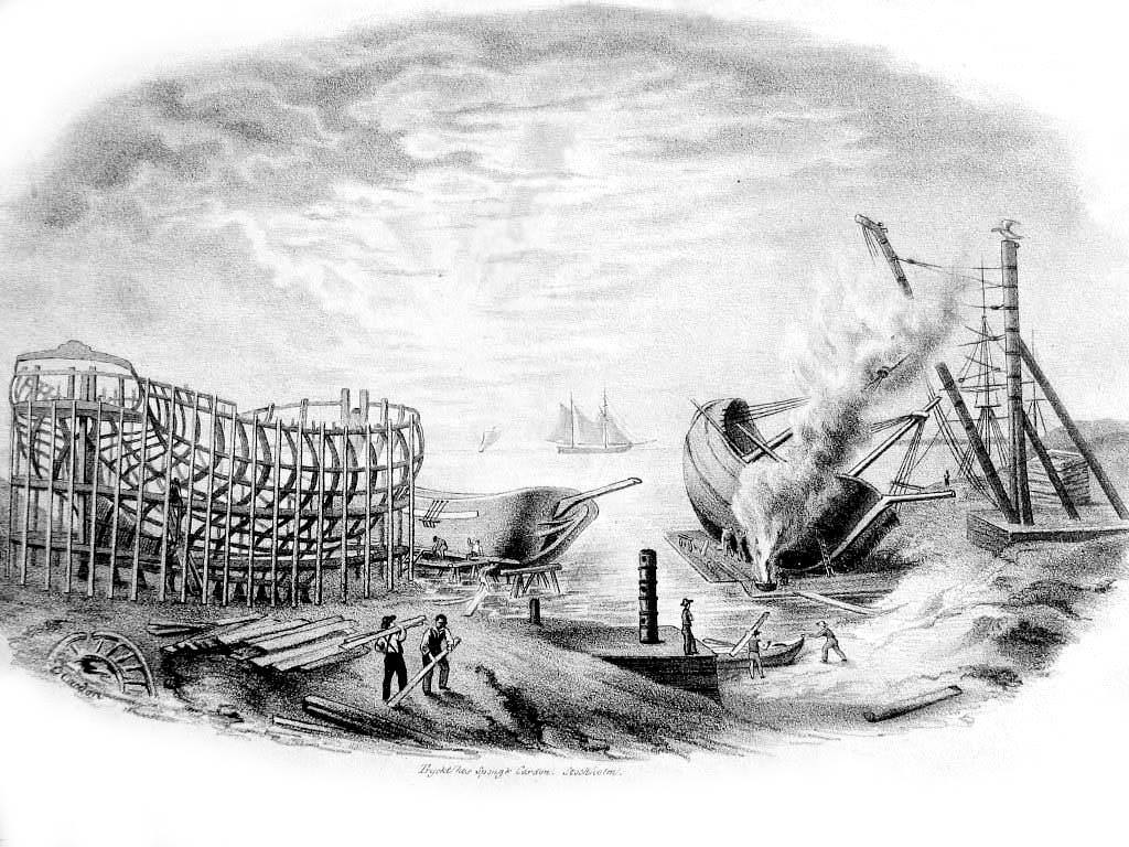 Turun vanha veneveistämö noin vuonna 1840. Litografiatyö, tekijä Oscar Cardon. Painettu Spong & Cardonin kivipainossa Tukholmassa. Kuva on esiintynyt vuonna 1841 painetussa vanhan veneveistämön osakekirjassa vinjettinä sekä Tukholmassa vuonna 1925 painetussa Govert Indebetoun teoksessa.